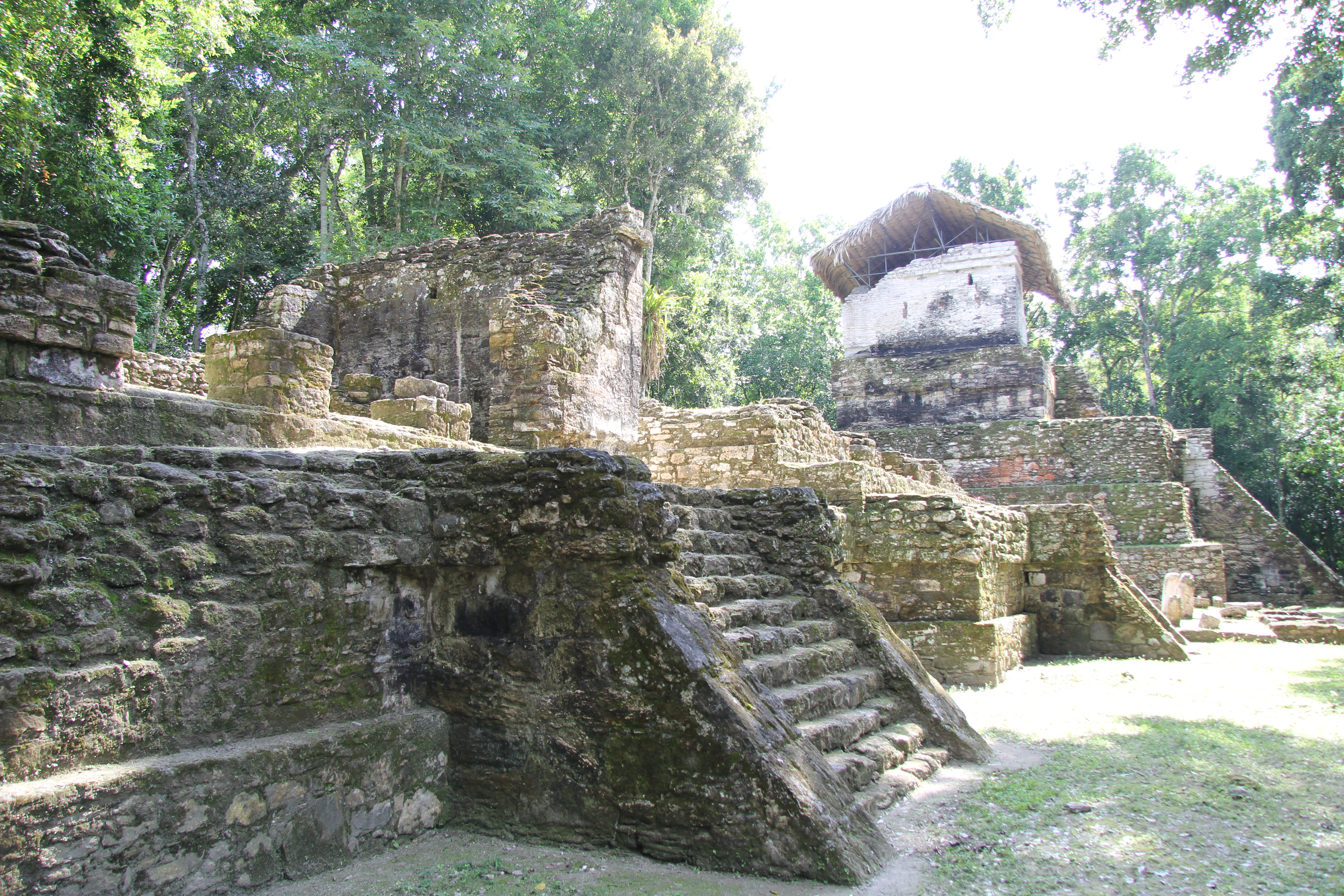 Ruinas mayas en la isla Topoxté, Parque Yaxhá Nakum Naranjo, Reserva de la Biosfera Maya, Petén, Guatemala